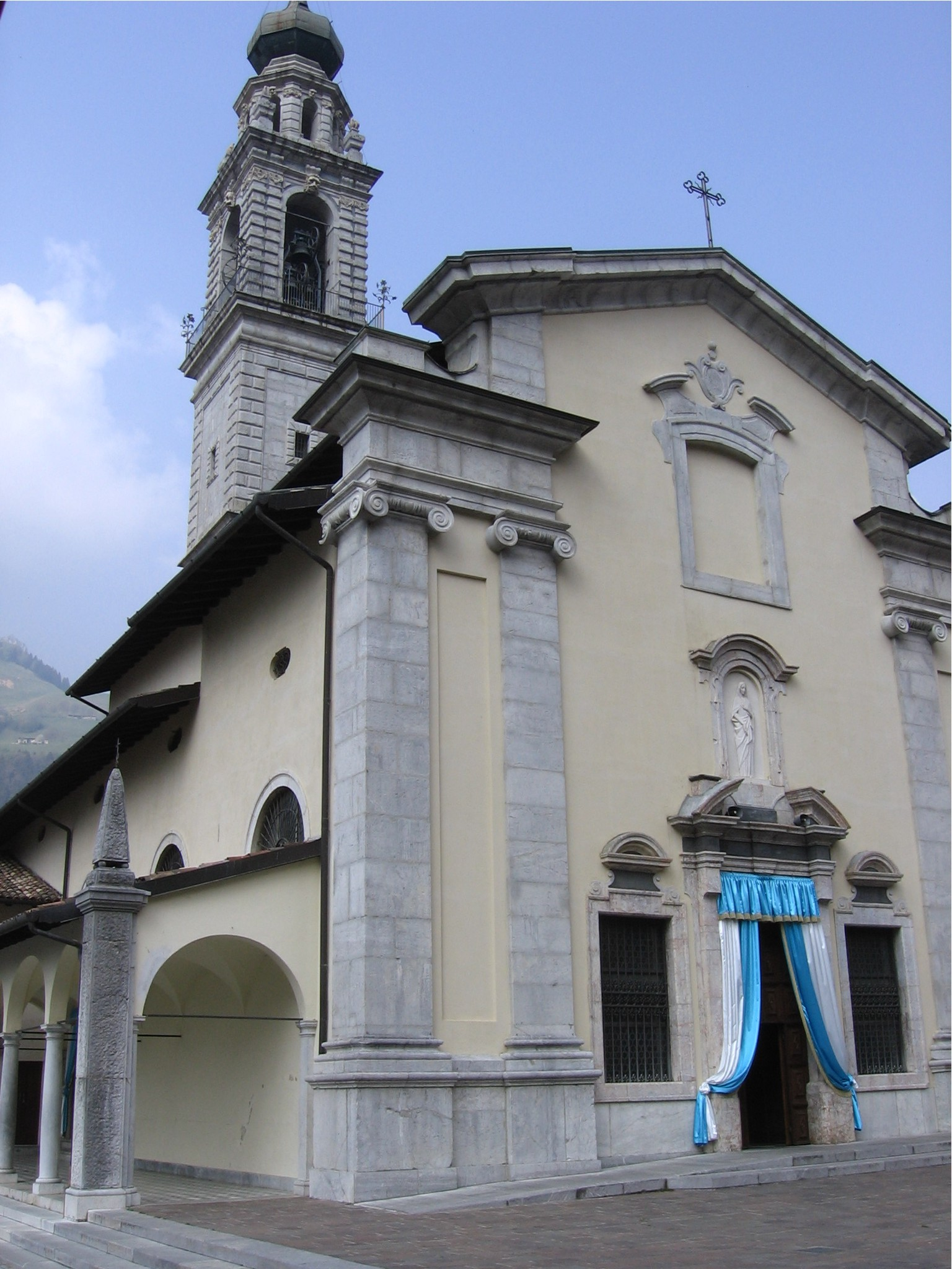 Santuario Madonna delle Grazie, Ardesio, Bergamo, Italia